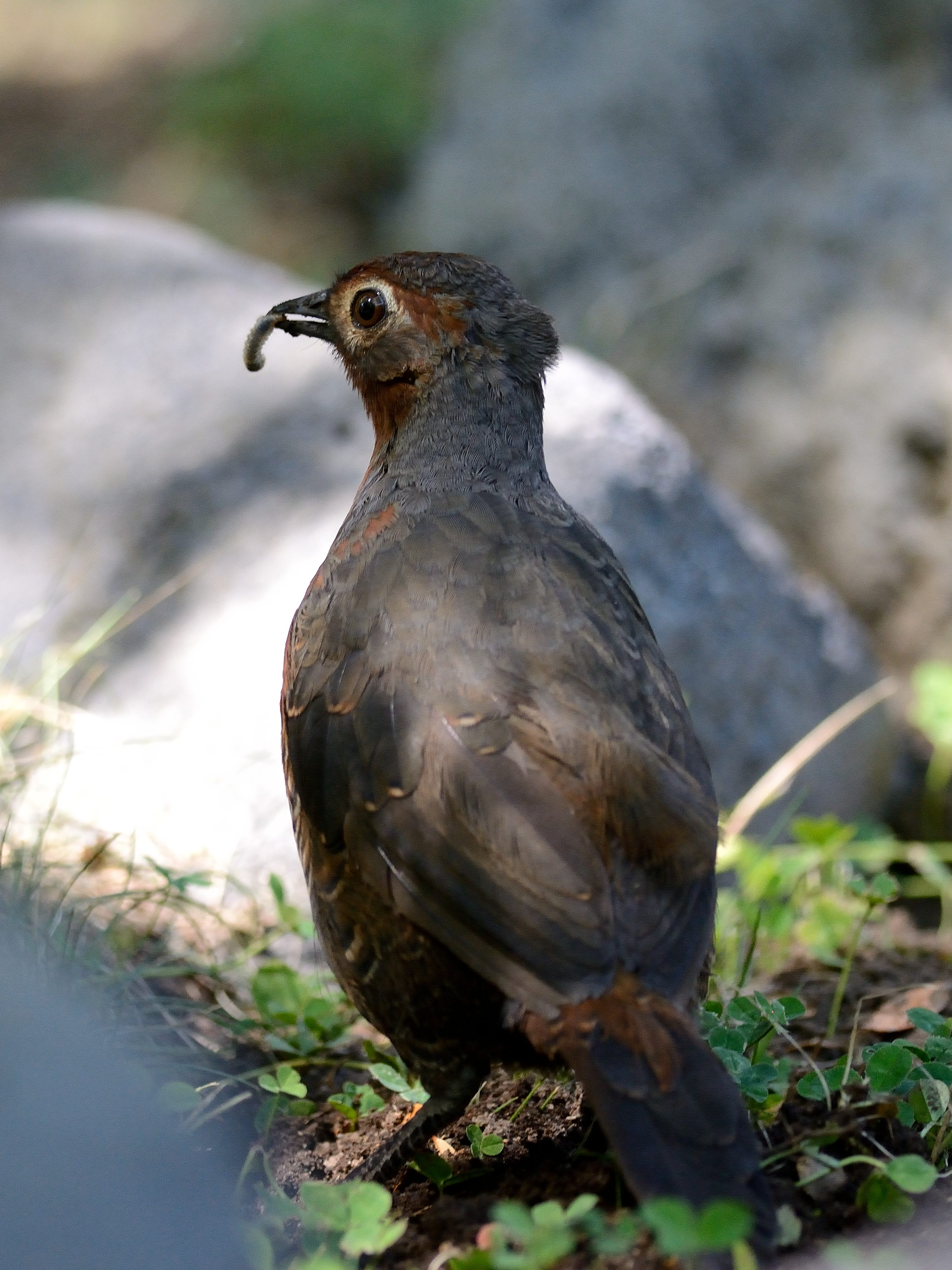 Hued Hued, Chillán, Chile